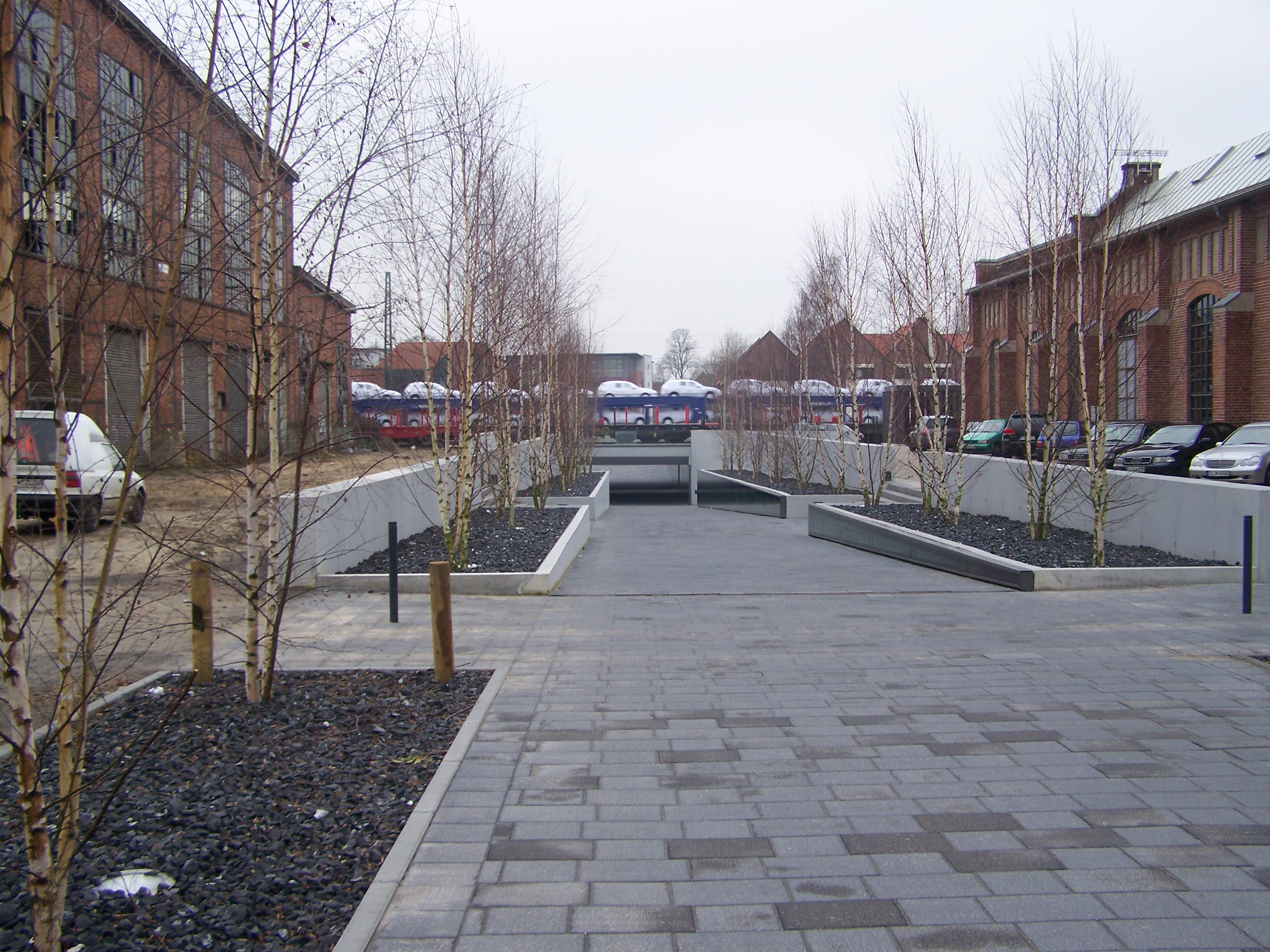 Der neue Bahnhofstunnel unter dem Bahnhof Lingen (Ems)